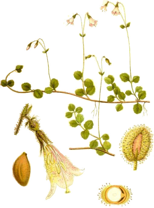 Linnaea borealis liggstammen med kortskott och blomställningar, o med fruktställning, blomma med delvis bortskuren krona (6/1), nöten (8/1), skenfrukten, d. v. s. nöten med sin spridningsapparat av två körtelhåriga skärmblad (8/1), o i tvärsnitt; av fruktens tre rum ses två tomma och hopfallna (svarta på bilden), det tredje med ett frö, som har frövita och centralt växtanlag (8/1).